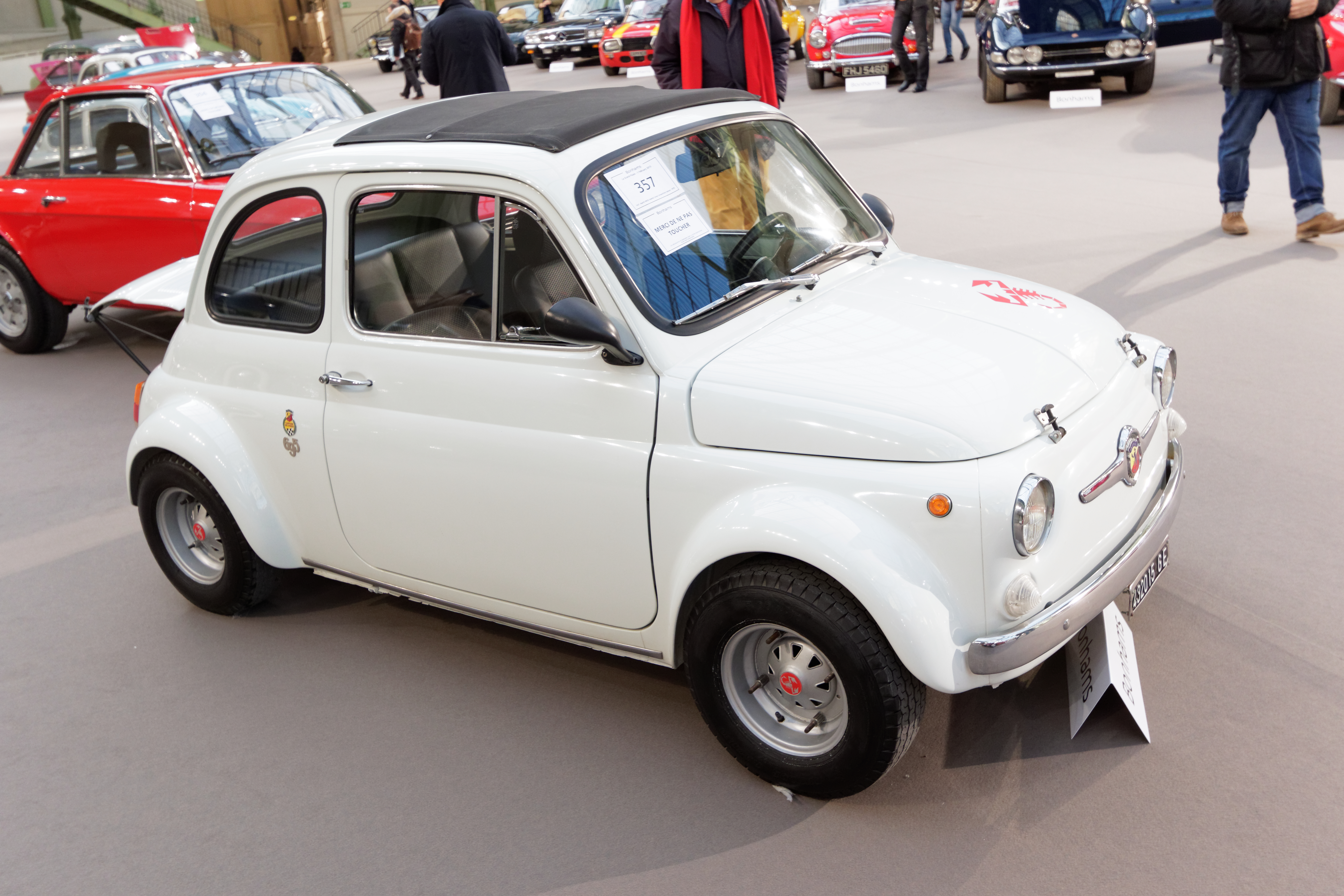 Un des véhicules présenté lors de la vente aux enchères Bonhams 2015 au Grand Palais de Paris.